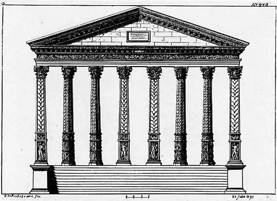 Plan du temple d'Yzeures proposé par Octave de Rochebrune